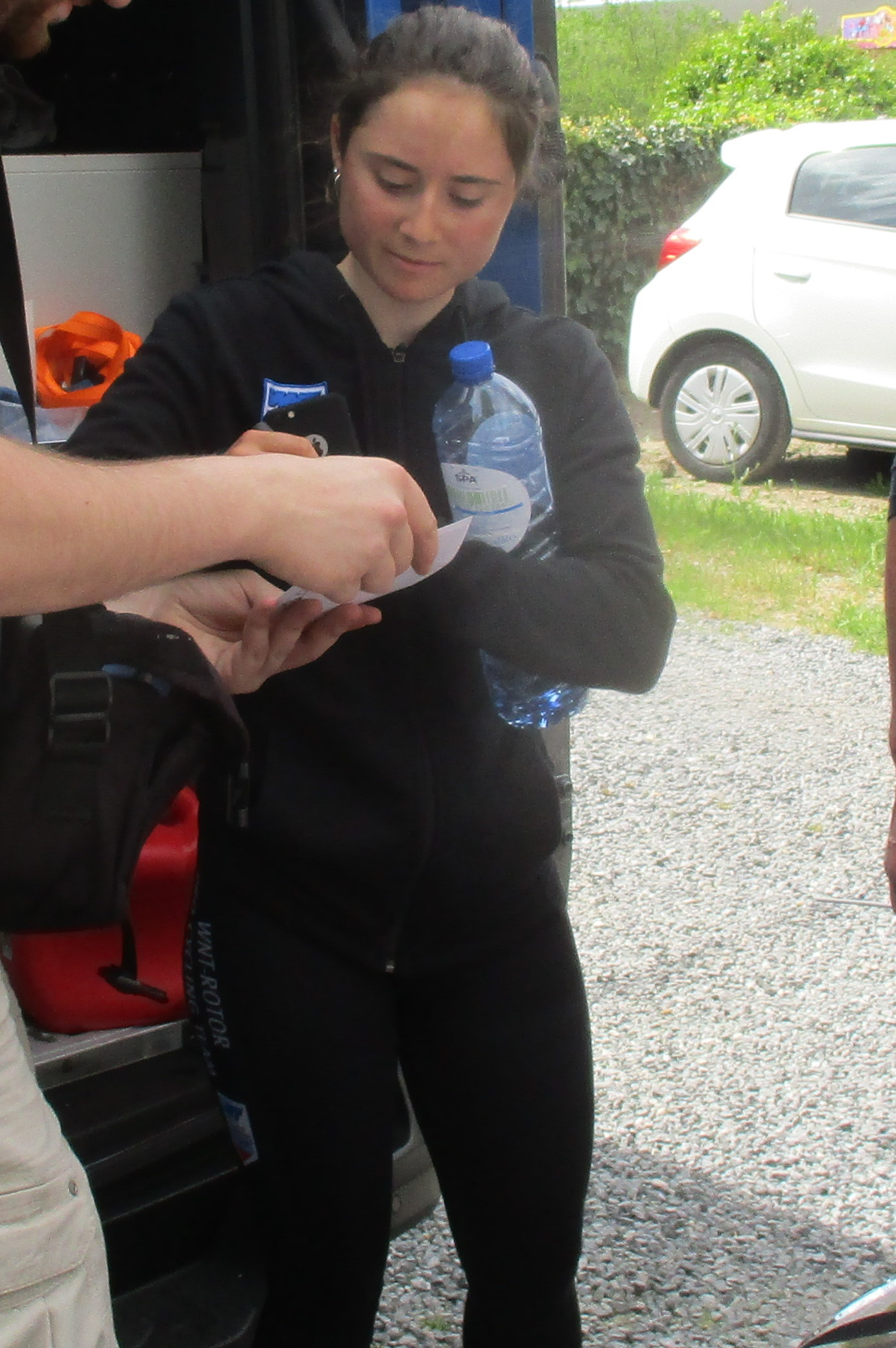 Finish van de Waalse Pijl 2019 voor vrouwen op de Mur de Huy